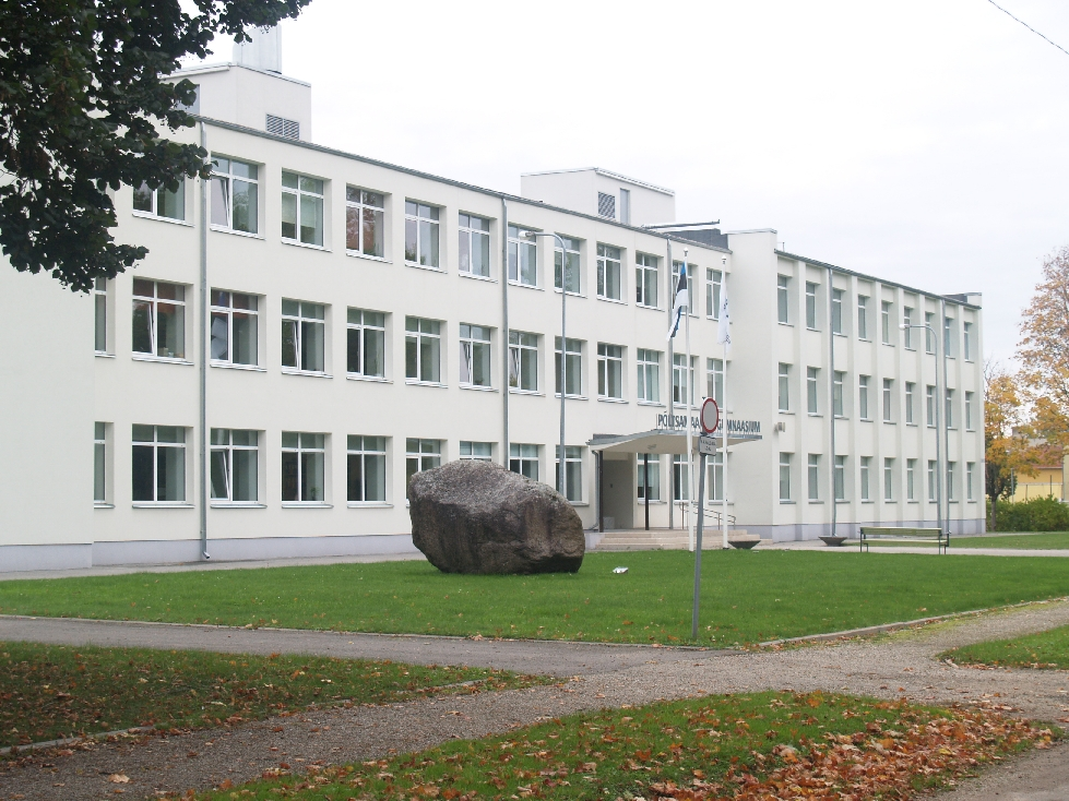 Põltsamaa vaade